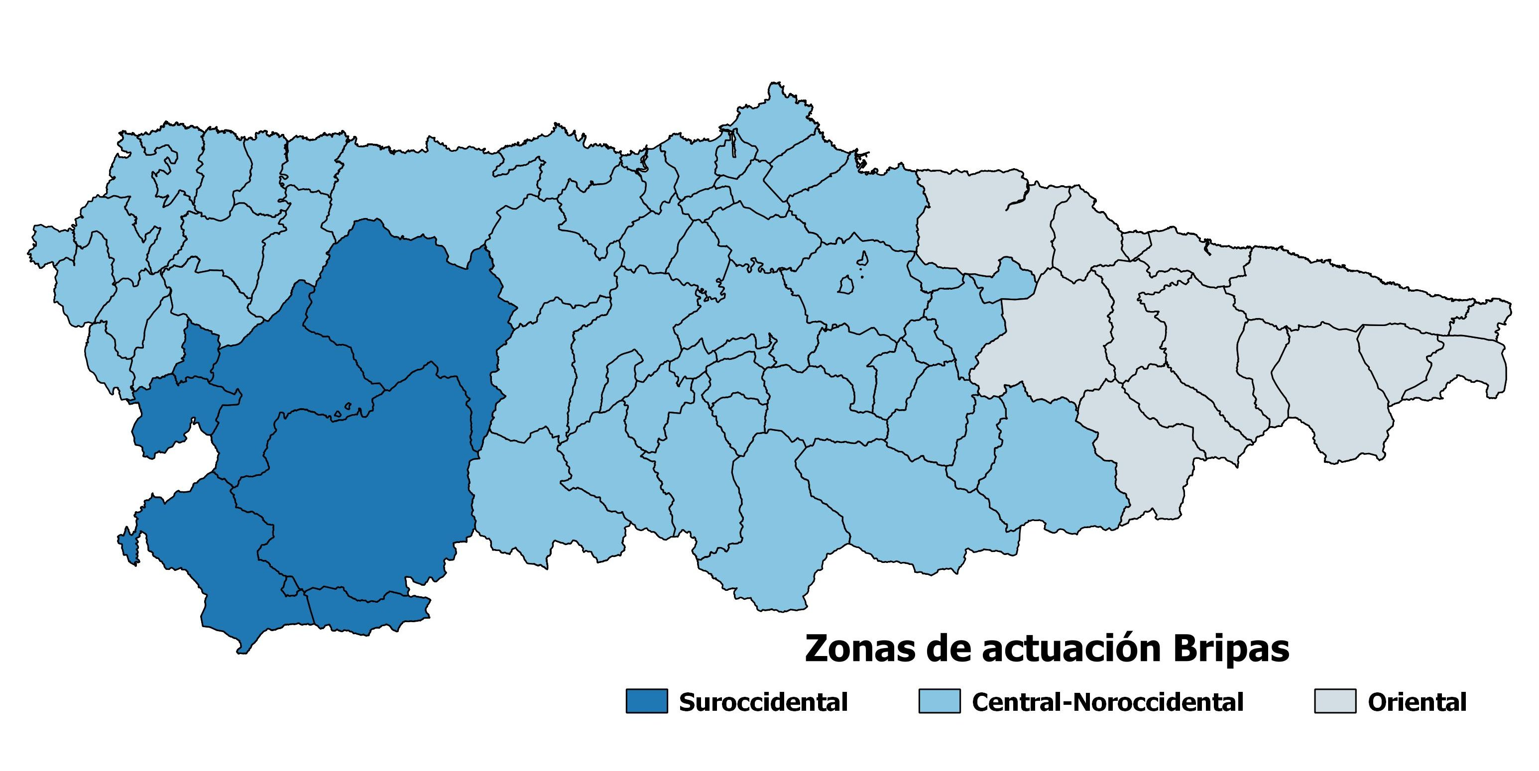 Ámbito de actuación de las Brigadas de Investigación de Incendios (BRIPAS) del Principado de Asturias.